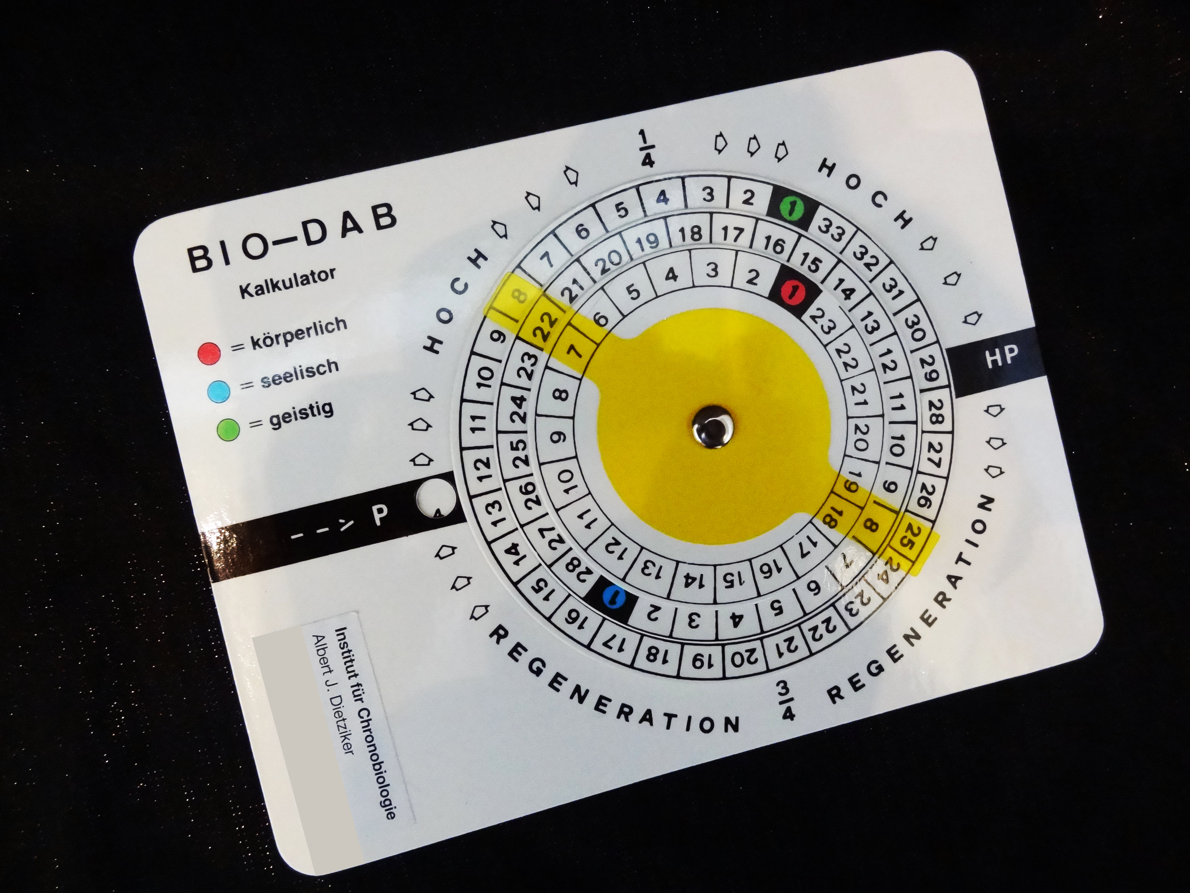 BIO-DAB-Kalkulator des Instituts für Chronobiologie Albert J. Dietziker.